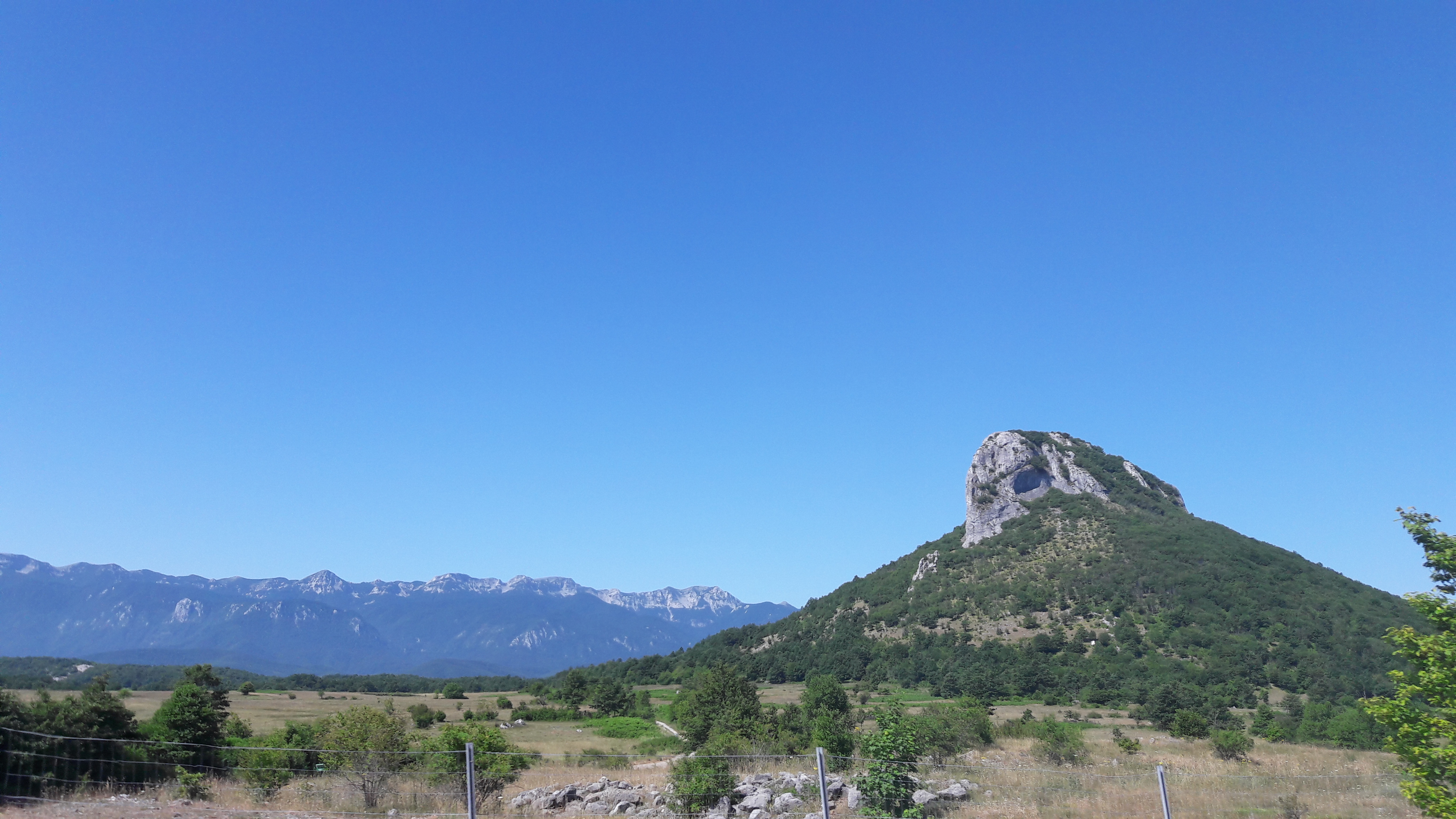 Guri i Mujit, Jutbinë